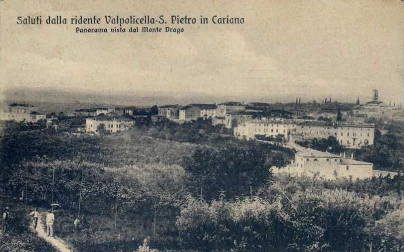 Panorama di San Pietro in Cariano (povincia di Verona) in una foto d'epoca